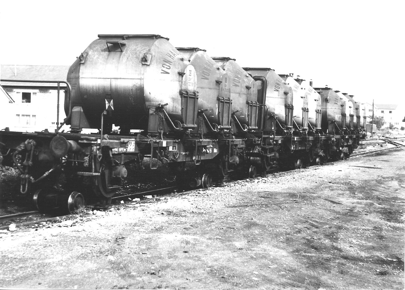 3 Von-Haus-zu-Haus Wagen auf Rollböcken, Buchau am Federsee